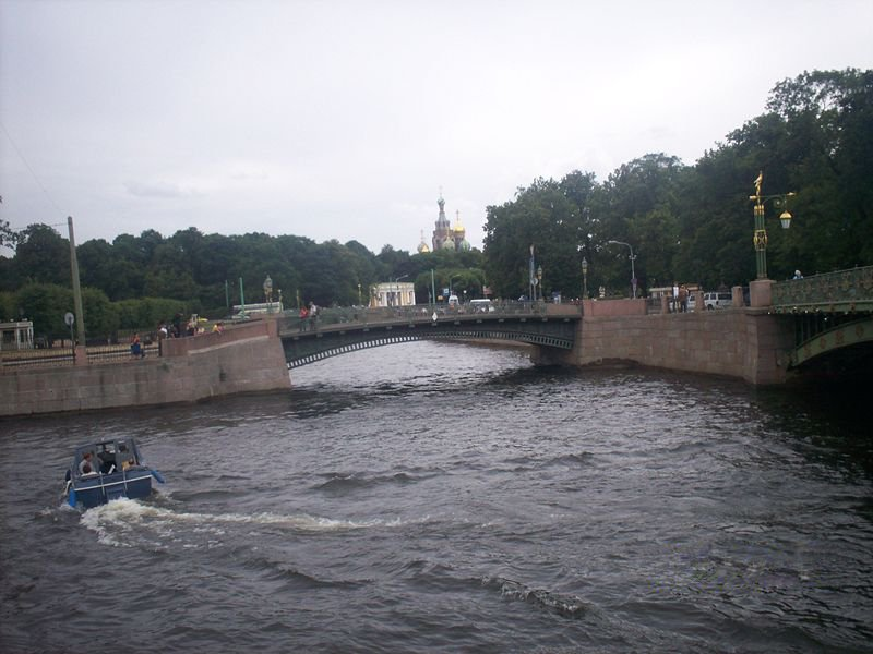 Исток реки Мойки из Фонтанки (г. Санкт-Петербург, Россия)